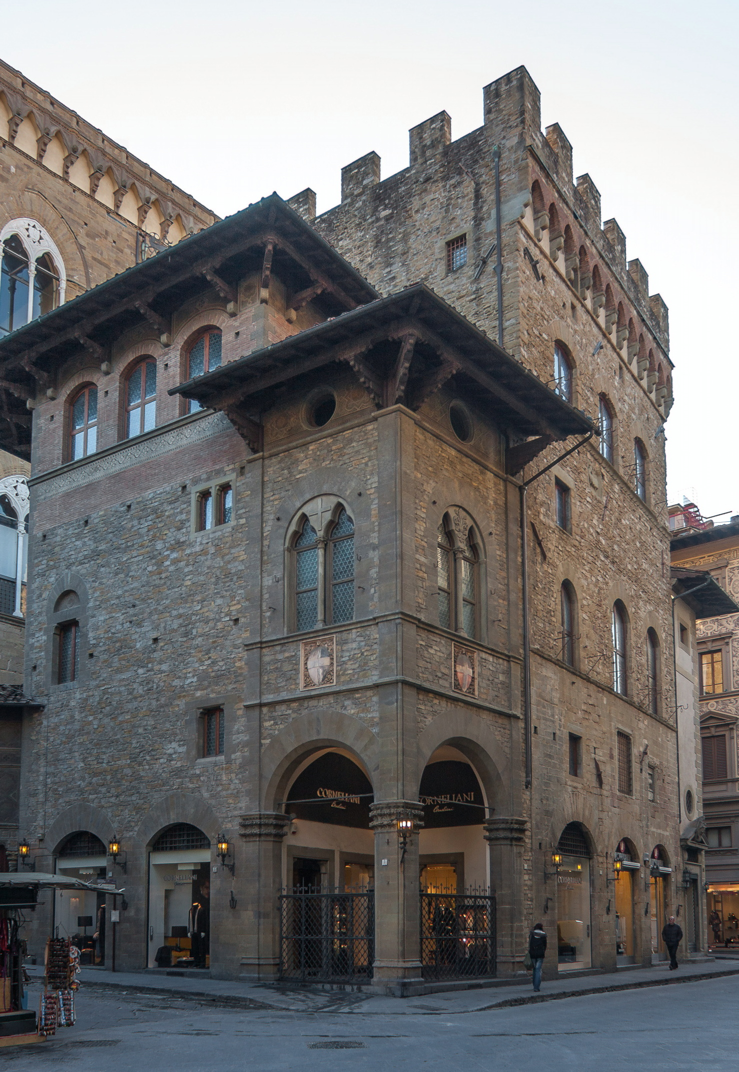 Palazzo del'Arte della Lana / Florence, Italy